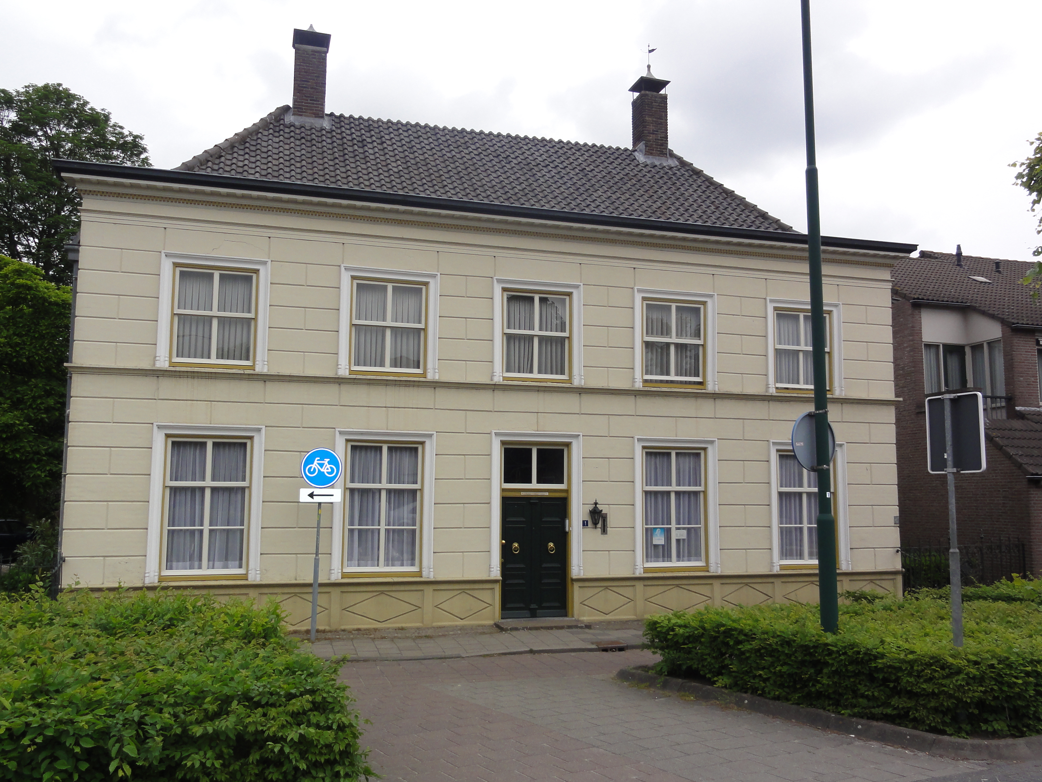 Bakel